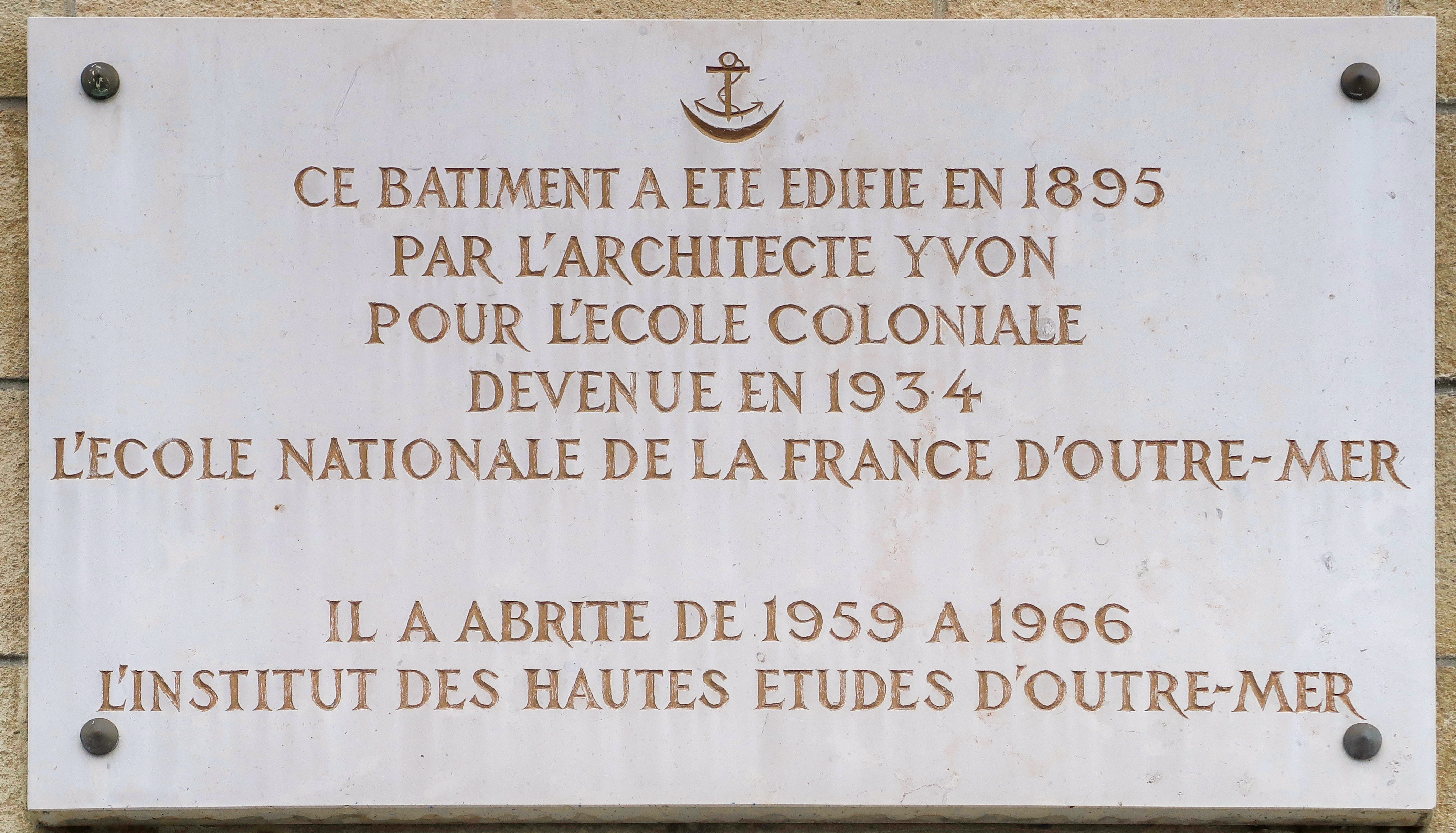 Plaque sur l'ancienne École coloniale, 2 avenue de l'Observatoire (Paris, 6e).